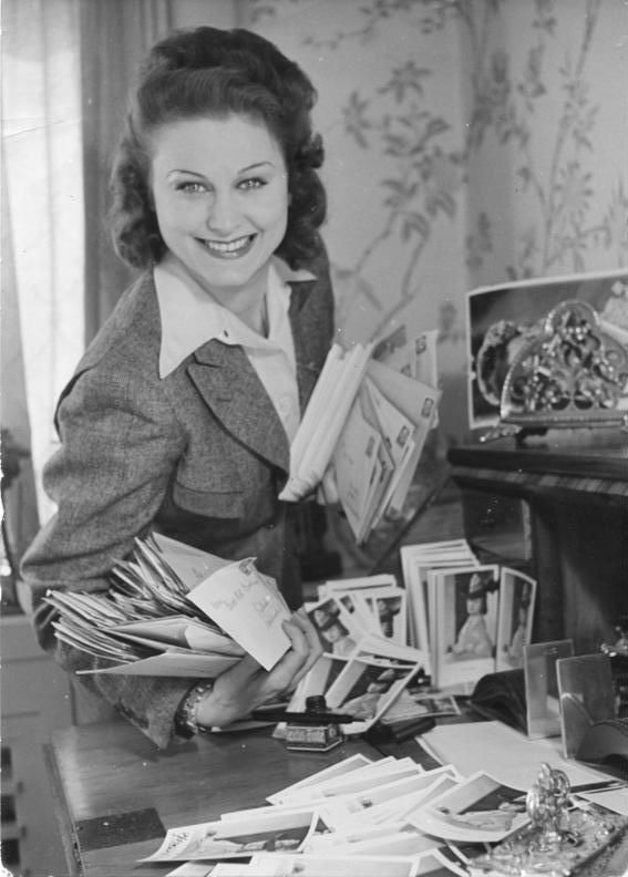 Die Filmschauspielerin Marika Rökk Post von einem Tag zeigt uns Marika Rökk, die alle Autogrammbitten, die sie von der Front erreichen, selbst in ihrer wenigen Freizeit beantwortet. Zwischen ihrer anstrengenden Filmtätigkeit stellte sie sich noch in den Dienst der Truppenbetreuung der deutschen Wehrmacht.